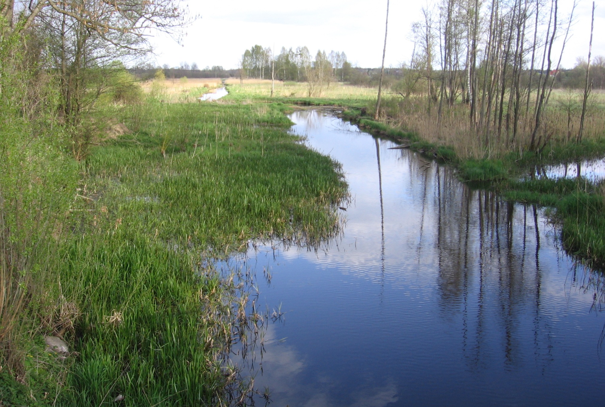 Narewka River in Białowieża